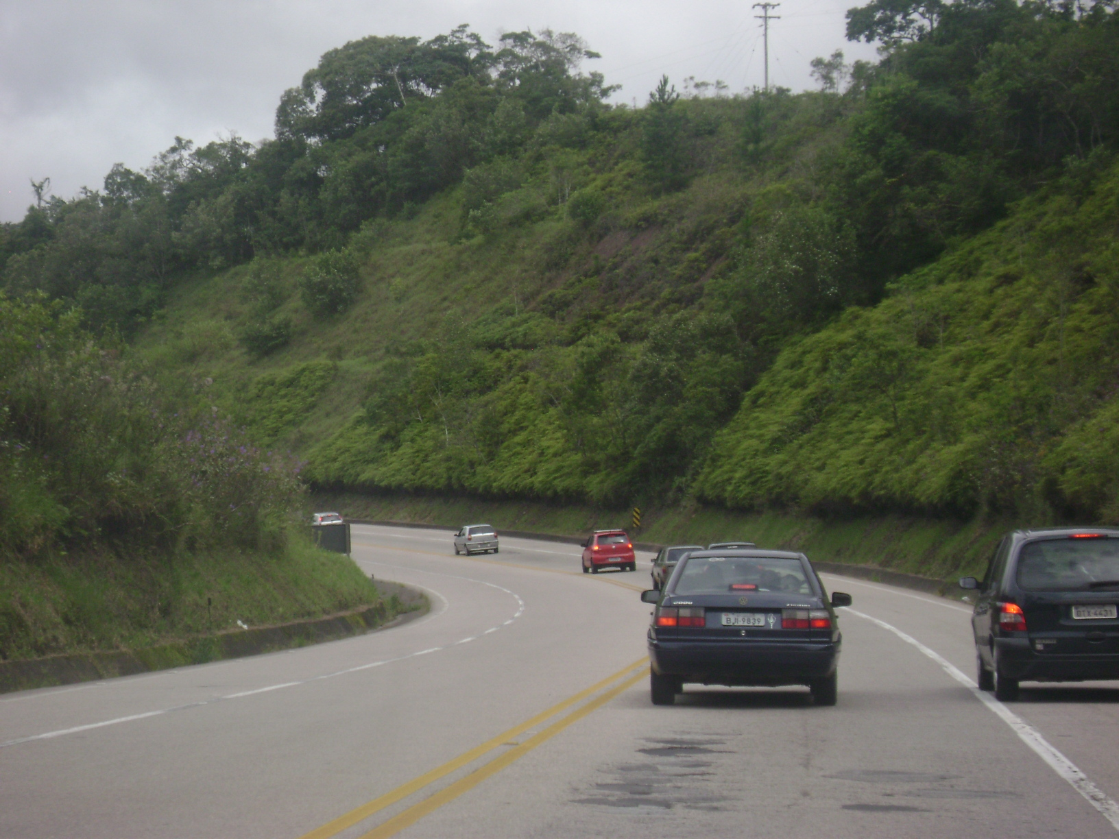 Rodovia dos Tamoios (SP-99) no trecho de planalto, em Paraibuna.